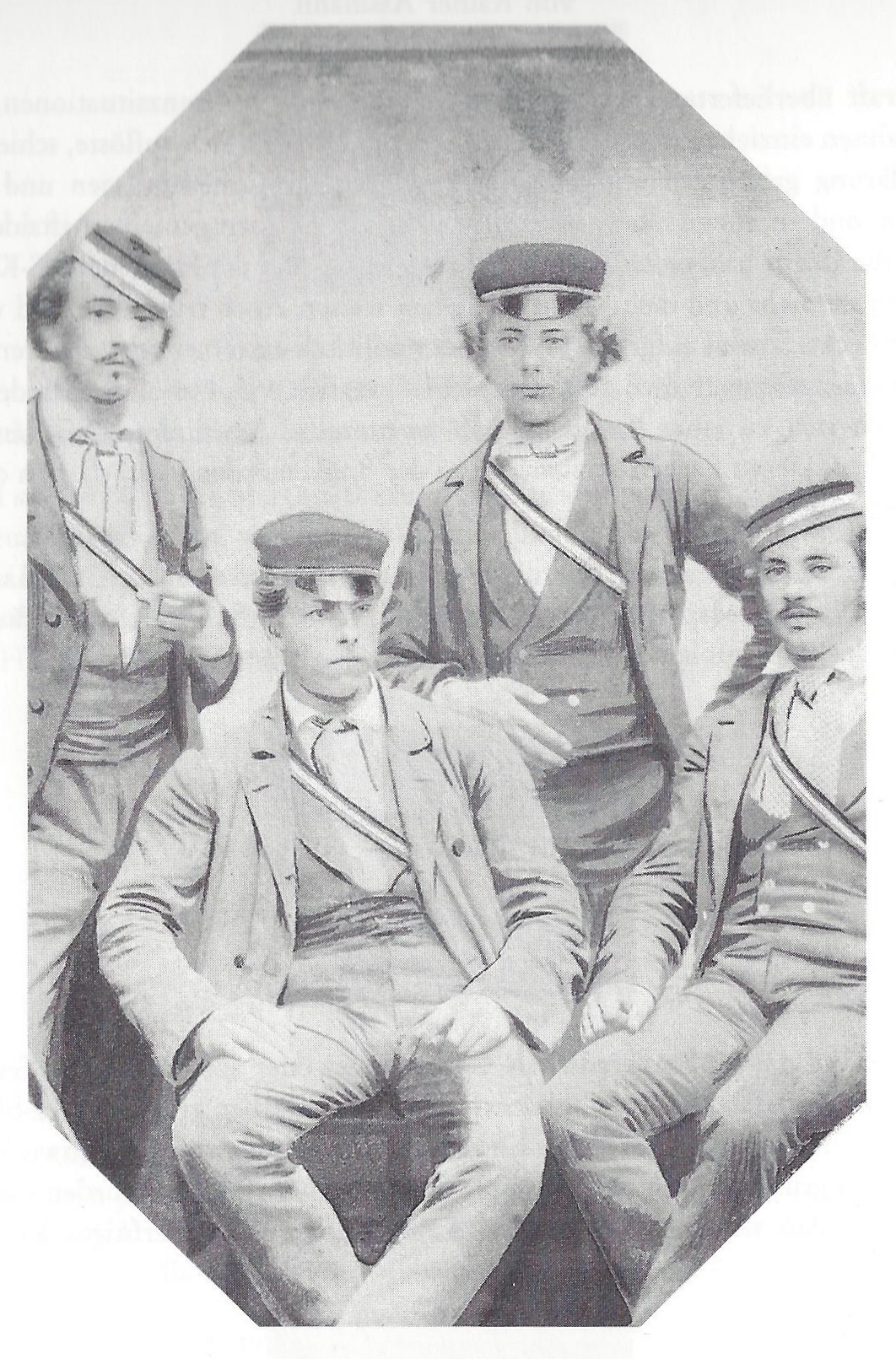 Fotografie von vier Siebenbürger Corpsstudenten an der Universität Tübingen